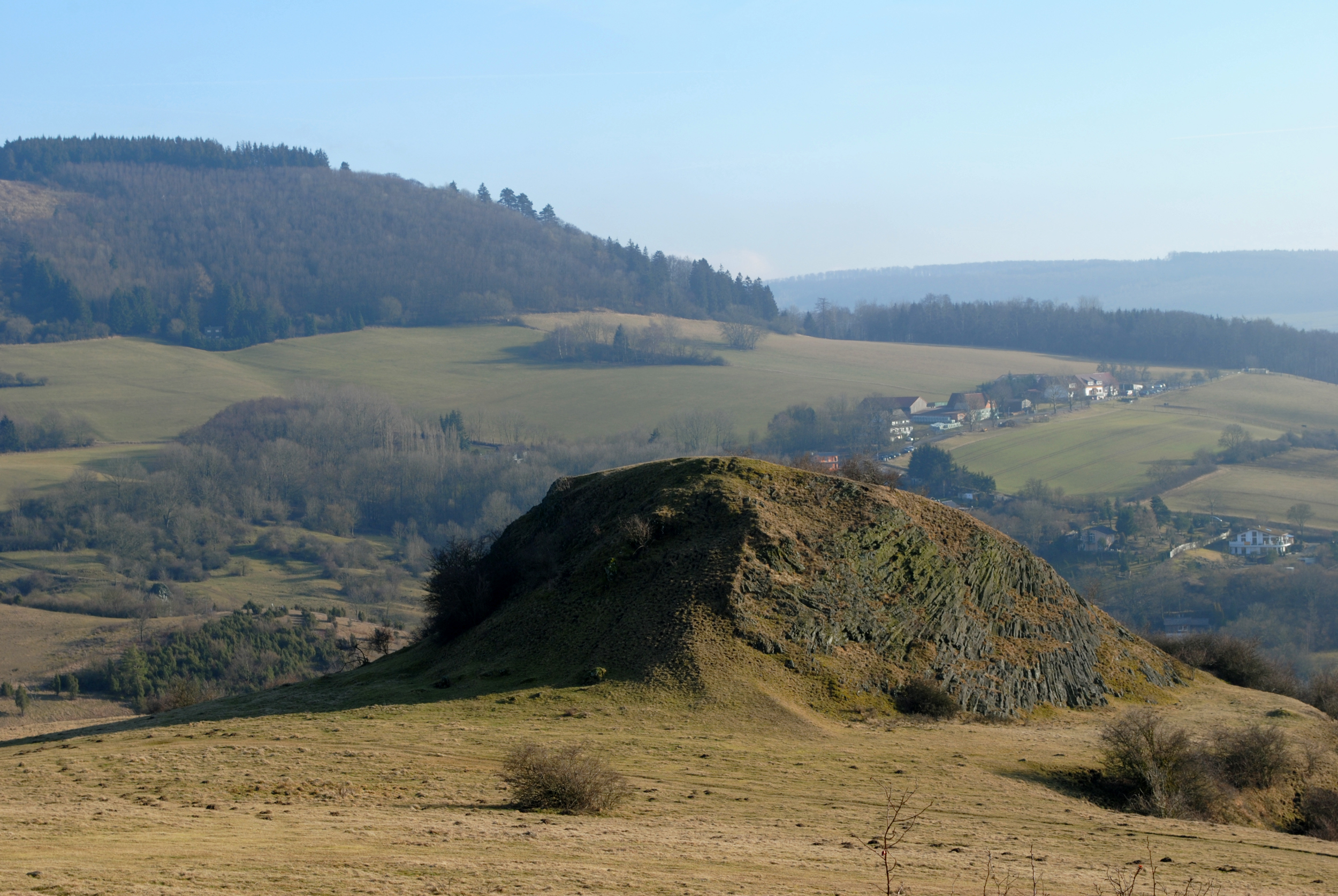 Typische Basalt-Felsformation im FFH-Gebiet „Dörnberg, Immelburg und Helfenstein“: Blick von der Zierenberger Kuppe (Kleiner Dörnberg) in südliche Richtung ins Heilerbachtal und zum Hohen Dörnberg (links im Hintergrund)